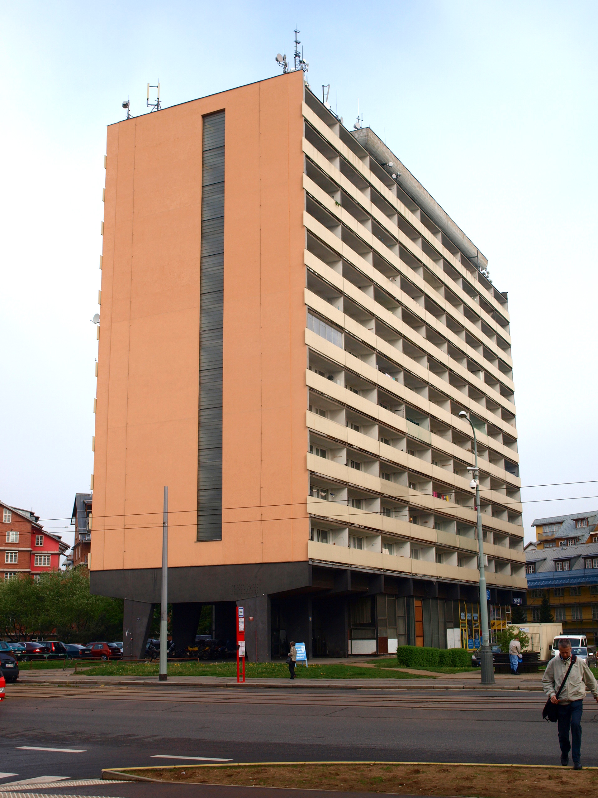 Petřiny